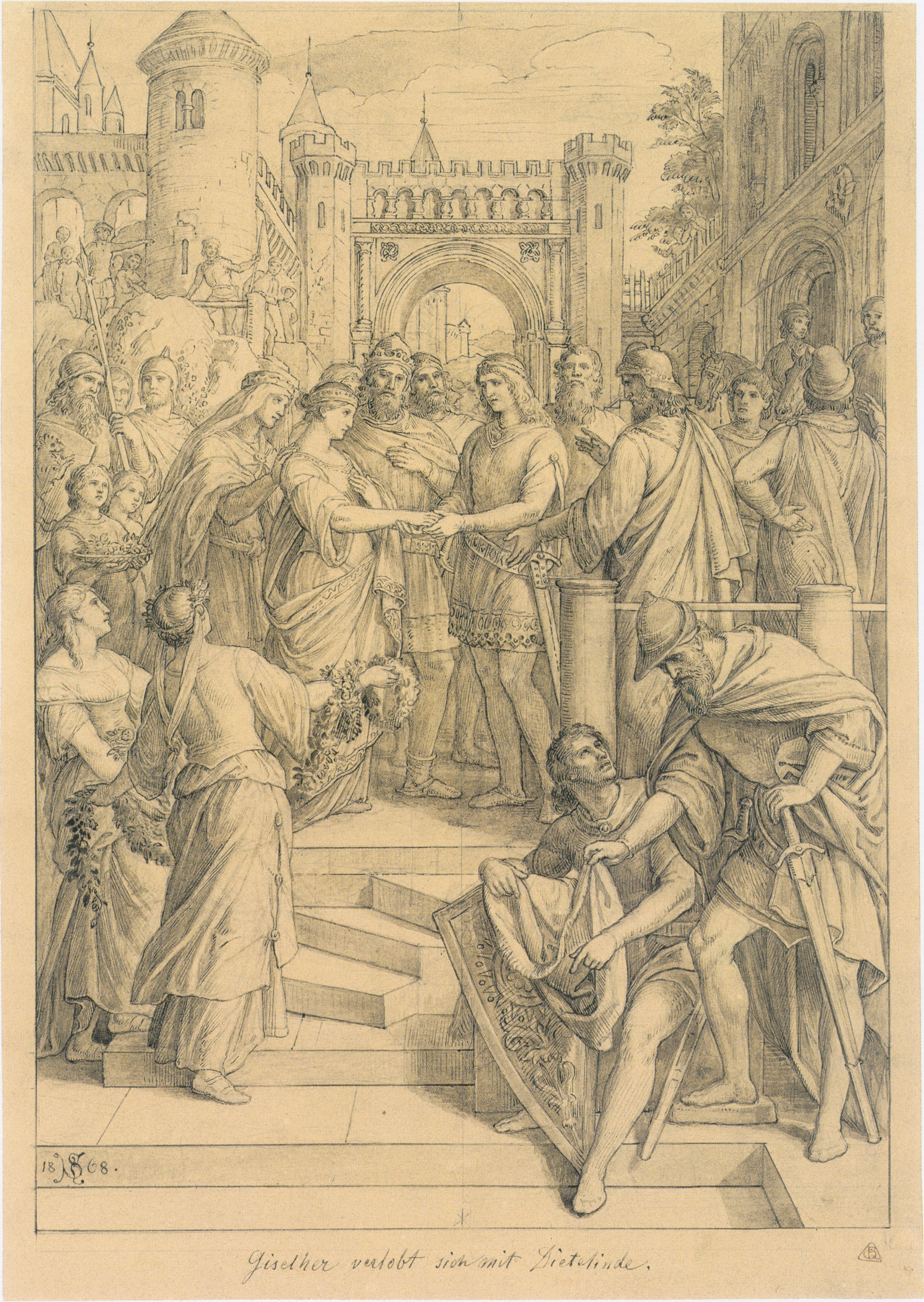 Giselher verlobt sich mit Dietelinde, 1868